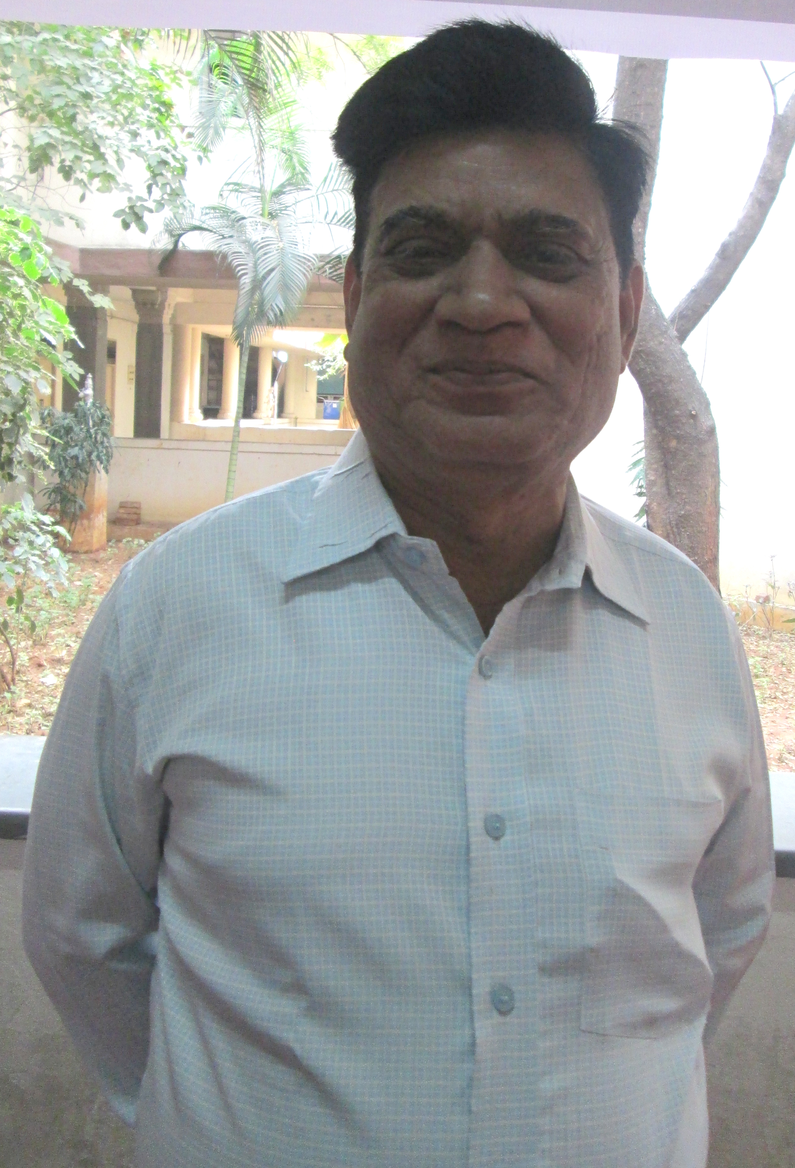 సుధామ